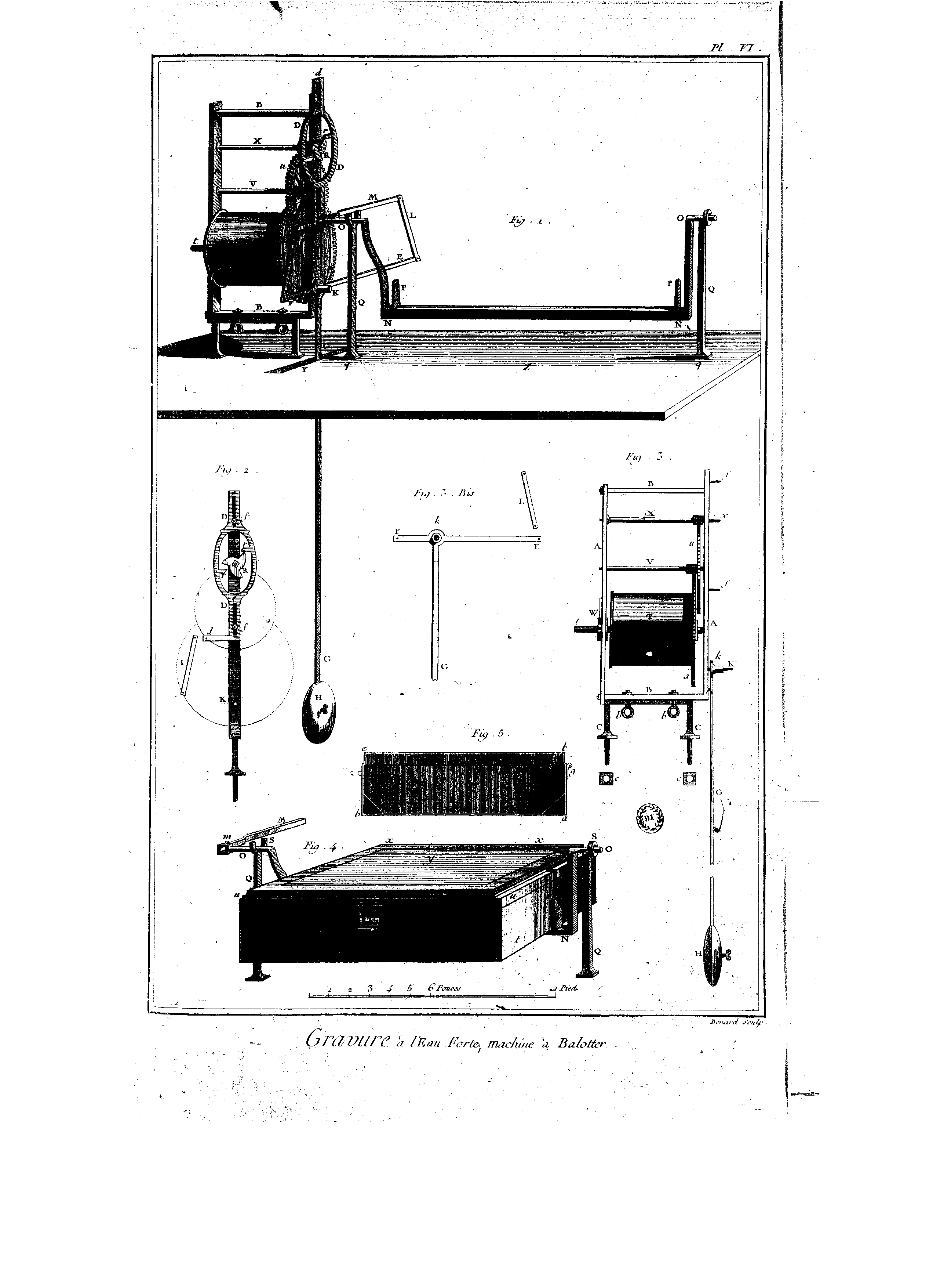 Planches de l'Encyclopédie de Diderot et d'Alembert, volume 4